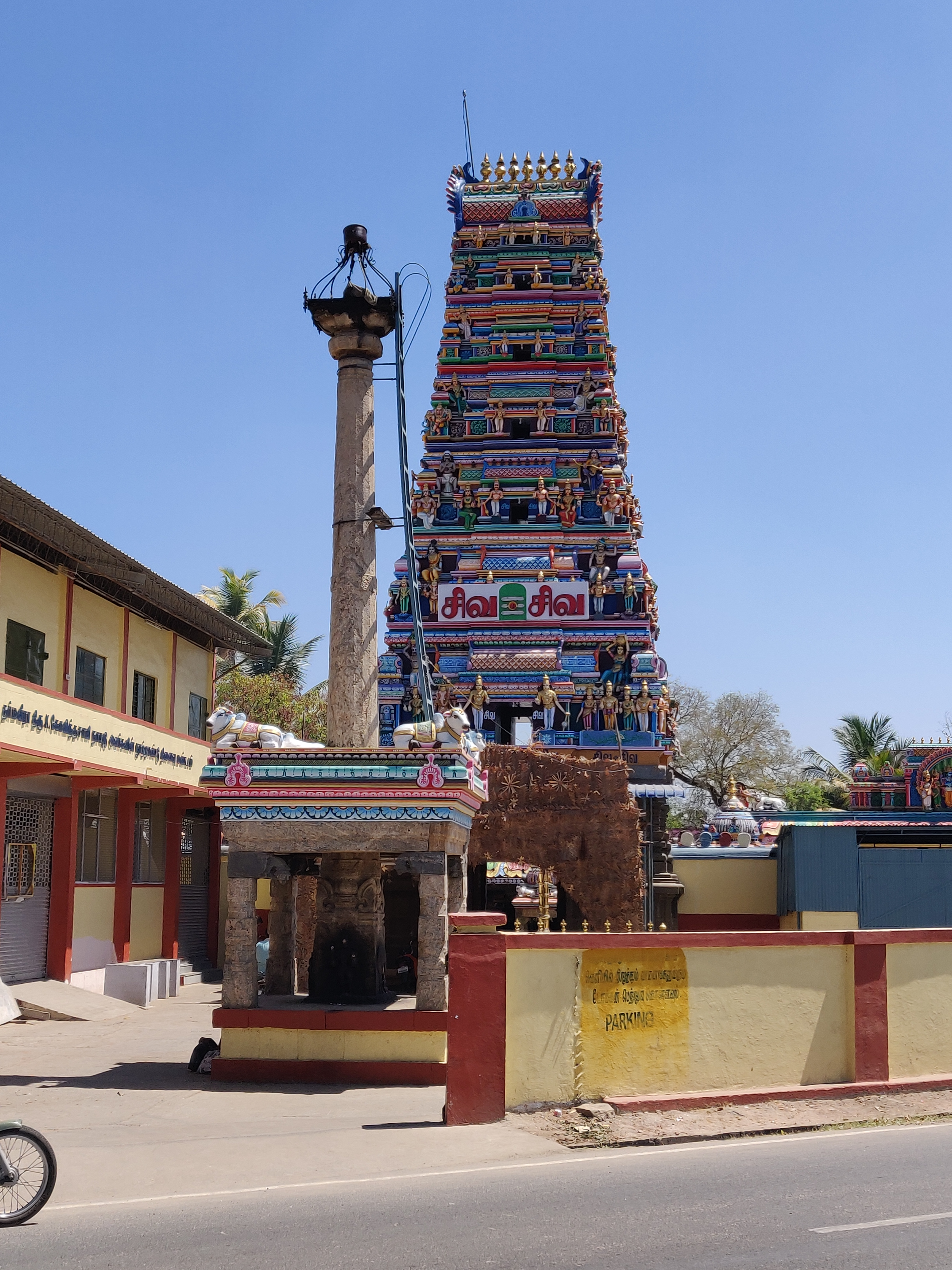 அன்னூர் மன்னீஸ்வரசுவாமி கோயில் நுழைவாயில்